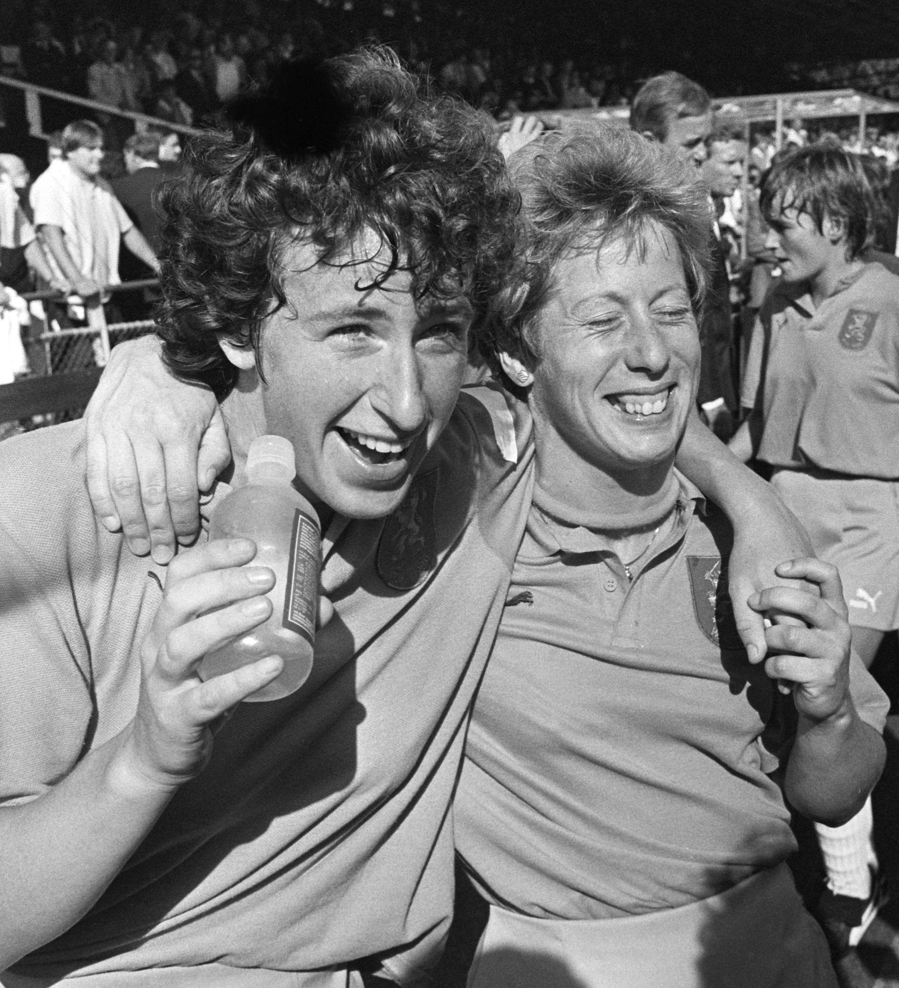 Finale WK-hockey dames: Ned. dames blij met medailles en beker na behalen WK; blijdschap bij captain Marjolein Eijsvogel (l) en S. von Weiler (r)